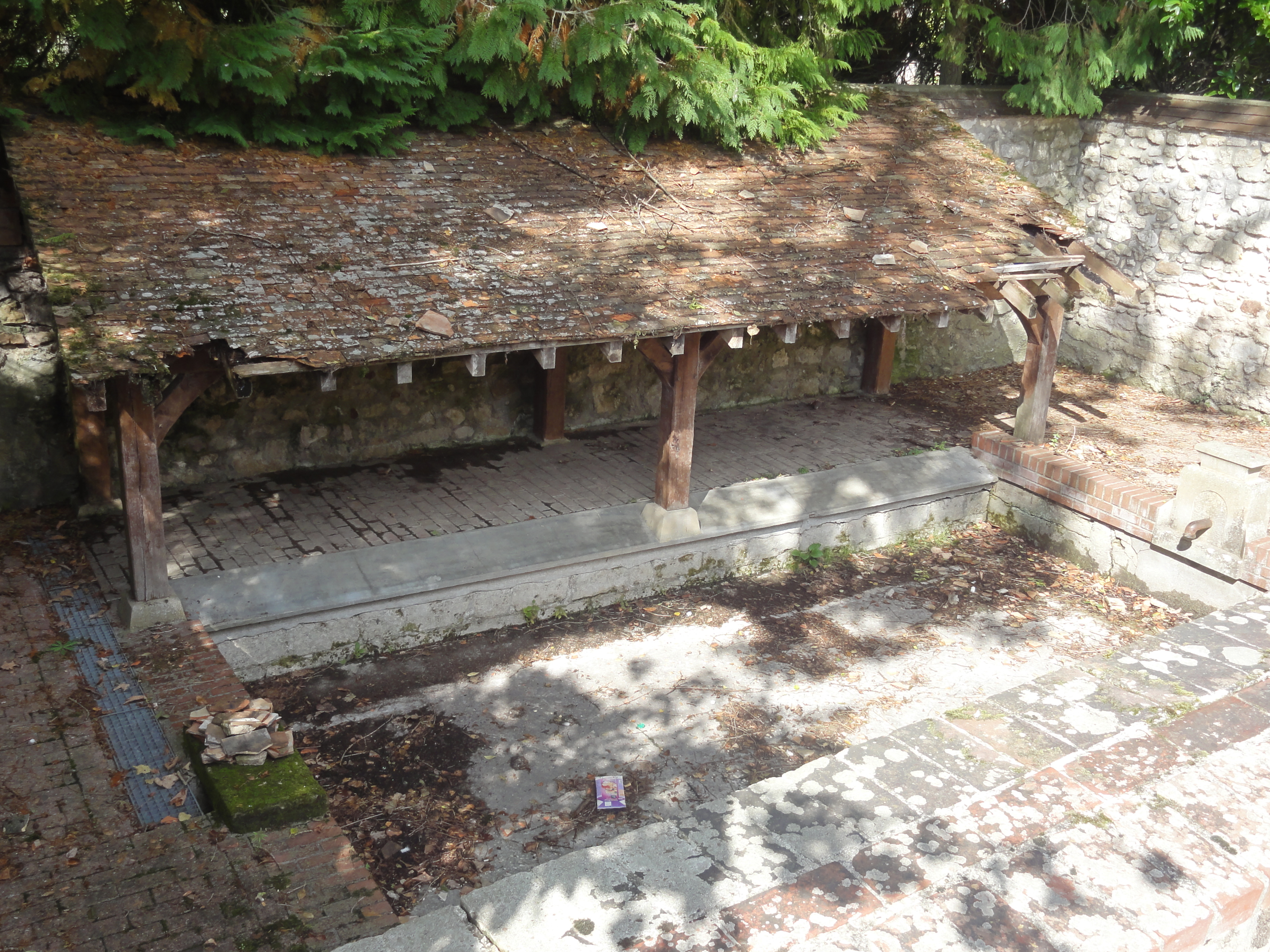 Lavoir couvert, rue de la Viosne.